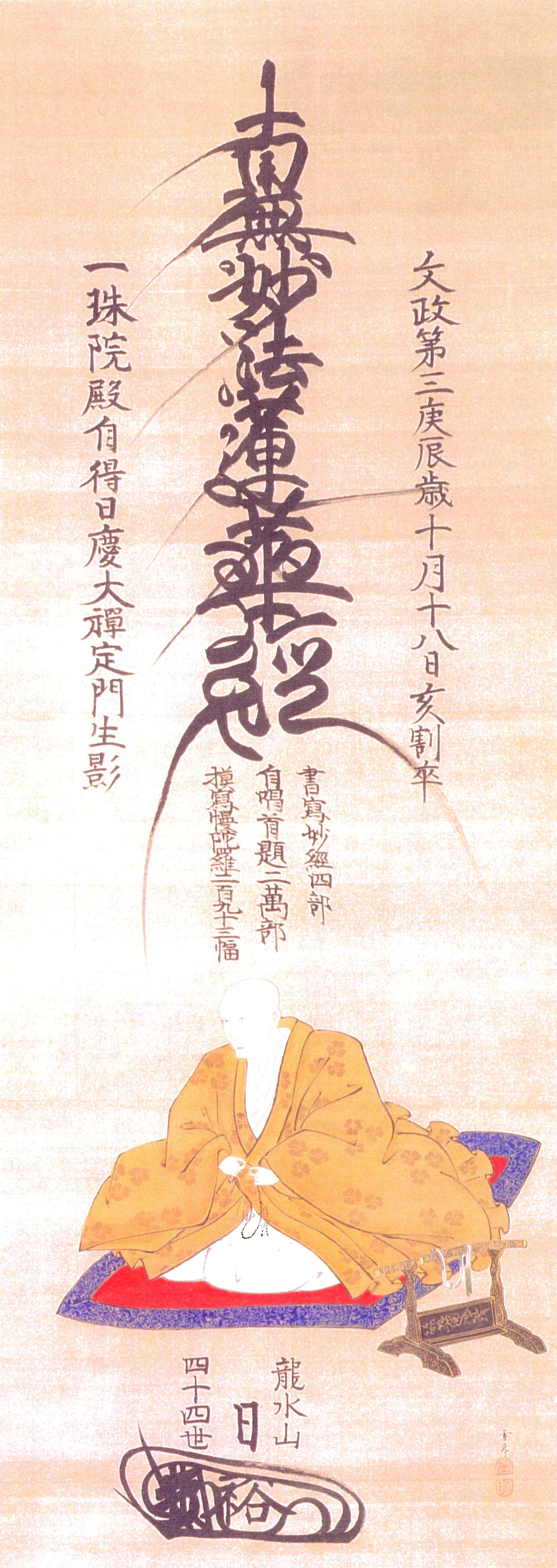 成瀬正典の肖像。